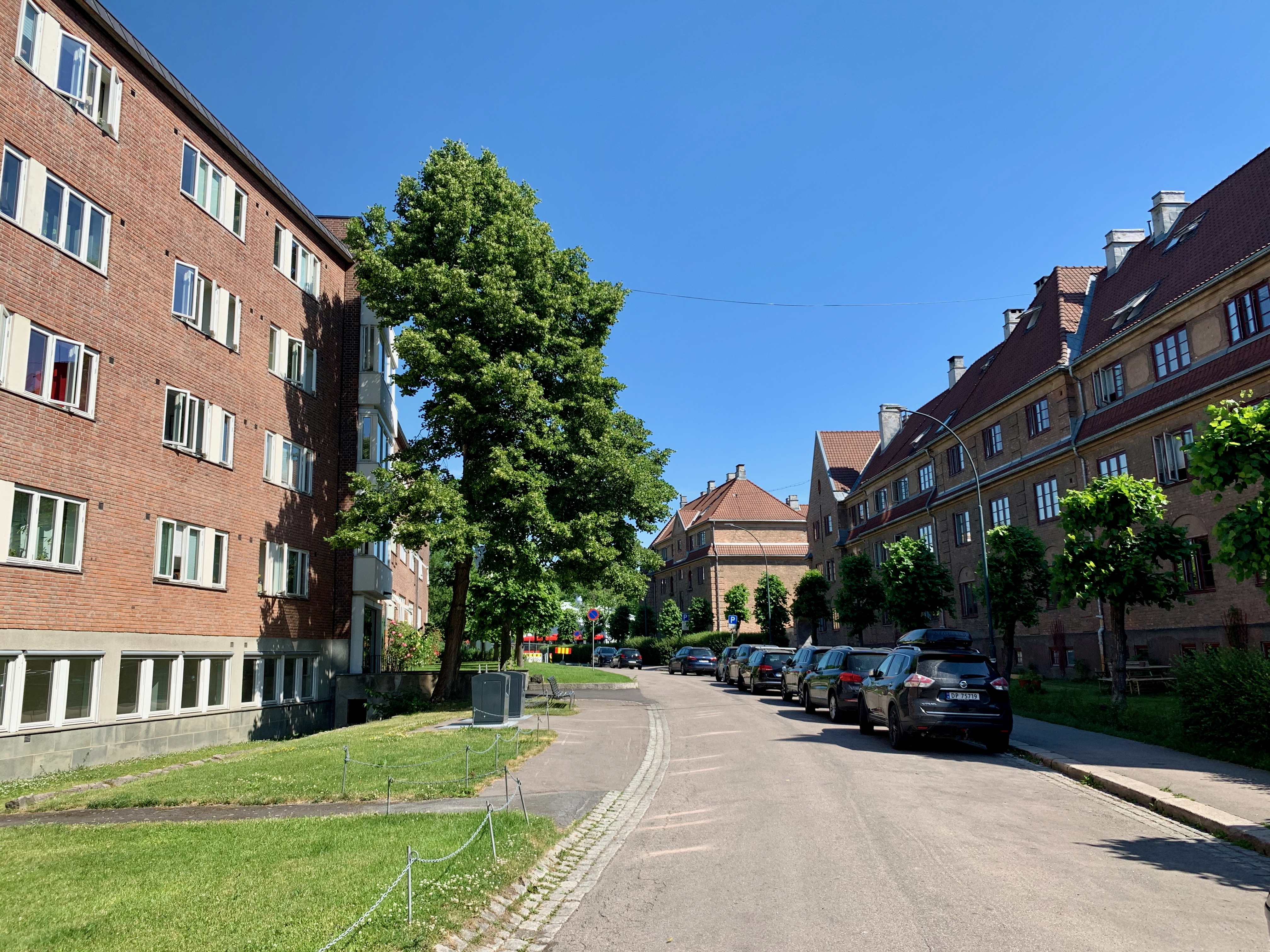 Armauer Hansens gate i Oslo